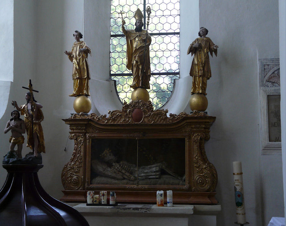 Kloster Seeon, Seeon-Seebruck, Germany